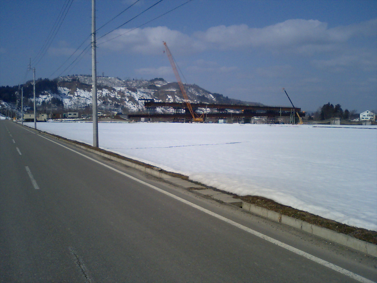 この画像は2009年2月7日投稿者によって、新潟県北魚沼郡川口町西川口西倉(投稿日現在は新潟県長岡市西川口西倉)にて撮影された、主桁設置途中の姿の牛ケ島大橋の写真。背景の山は山本山 (小千谷市)。